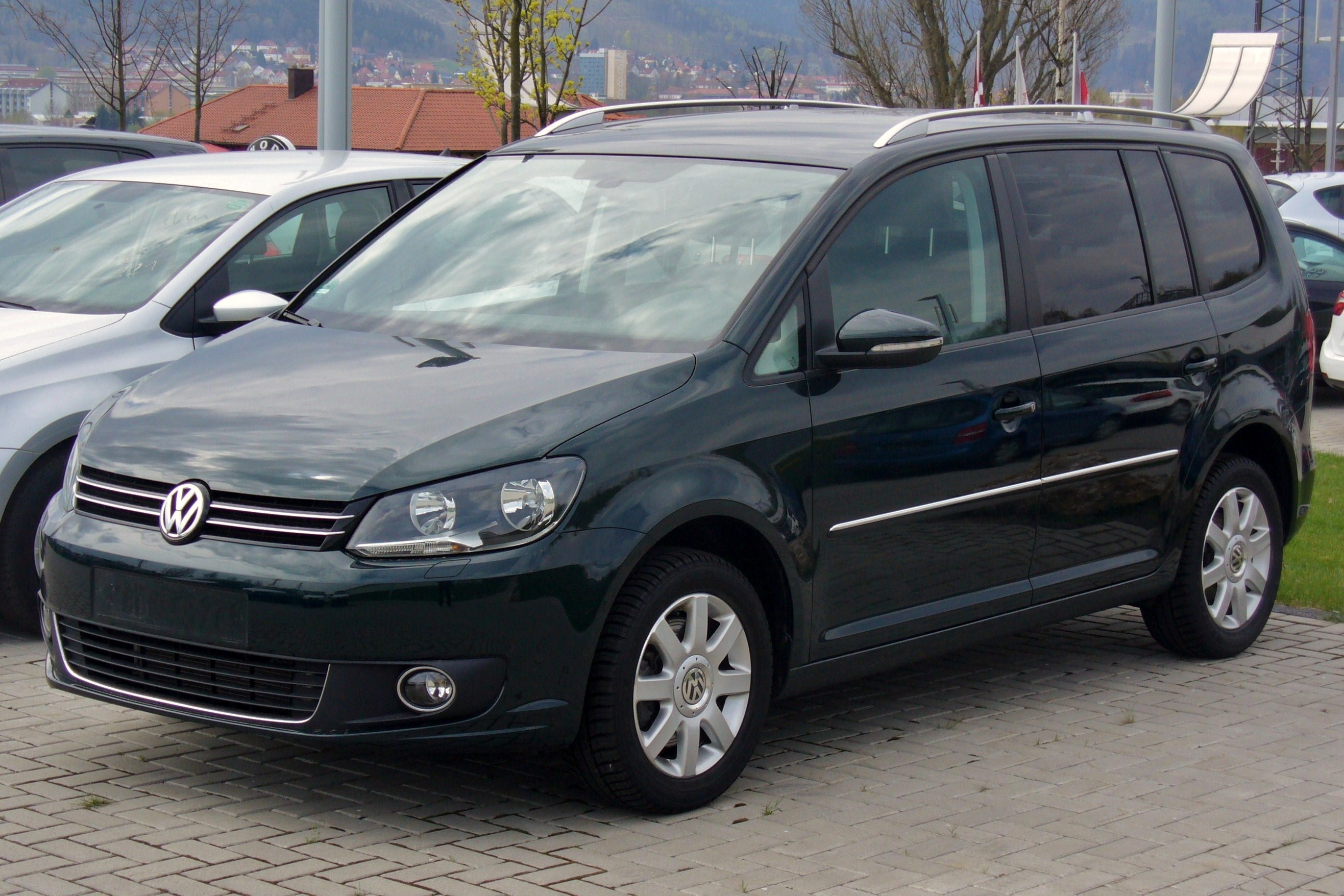 Volkswagen Touran Facelift II